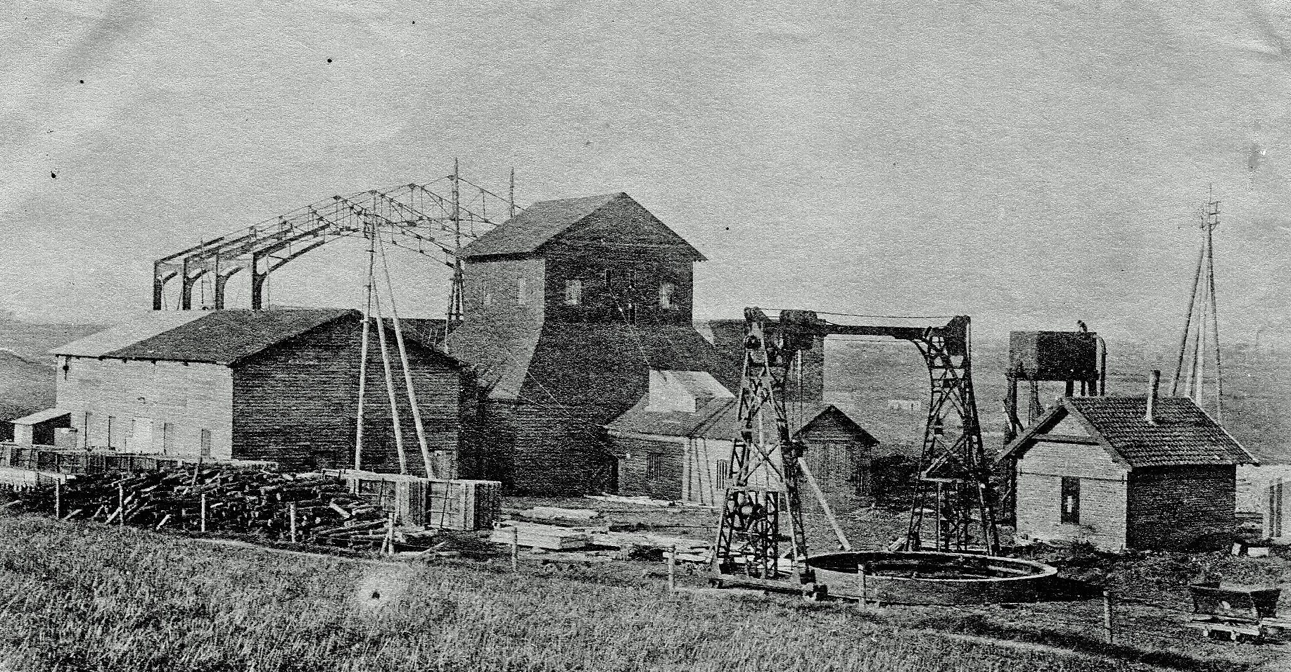 Construction de la Fosse N°6 des Mines de Marles Photo originale albuminée extérieur noir et blanc - Construction de la Fosse N° 6 des mines de Marles en 1903, par la Société des Mines de Marles (Pas-de-Calais). Document tiré du fonds de l'album Le Cornec, ingénieur chef mécanicien. Cet ingénieur en hydrauliques et spécialiste d'installation de pompes a voyagé comme officier sur le Yacht-steamer "Sans Peur", bateau de M. Etienne Fould qui l'a acquis en 1887. Puis, à partir de 1900, on le retrouve à Auchel (Pas-de Calais) où il travaille pour la Compagnie des Mines de Marles.